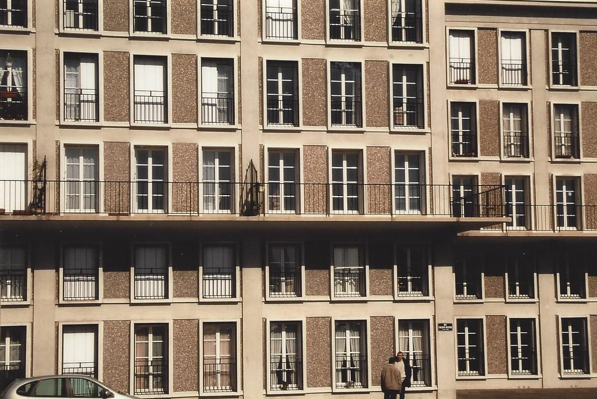 Wohnblock der 1950er Jahre in Le Havre